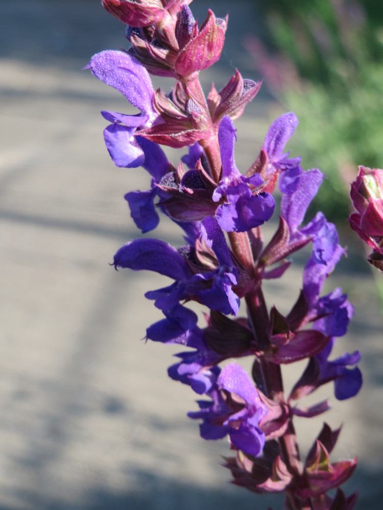 Der seltene Hain-Salbei (Salvia nemorosa) in Hockenheim-Talhaus